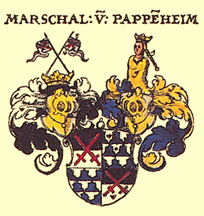 Wappen der Freiherren Marshall von Pappenheim